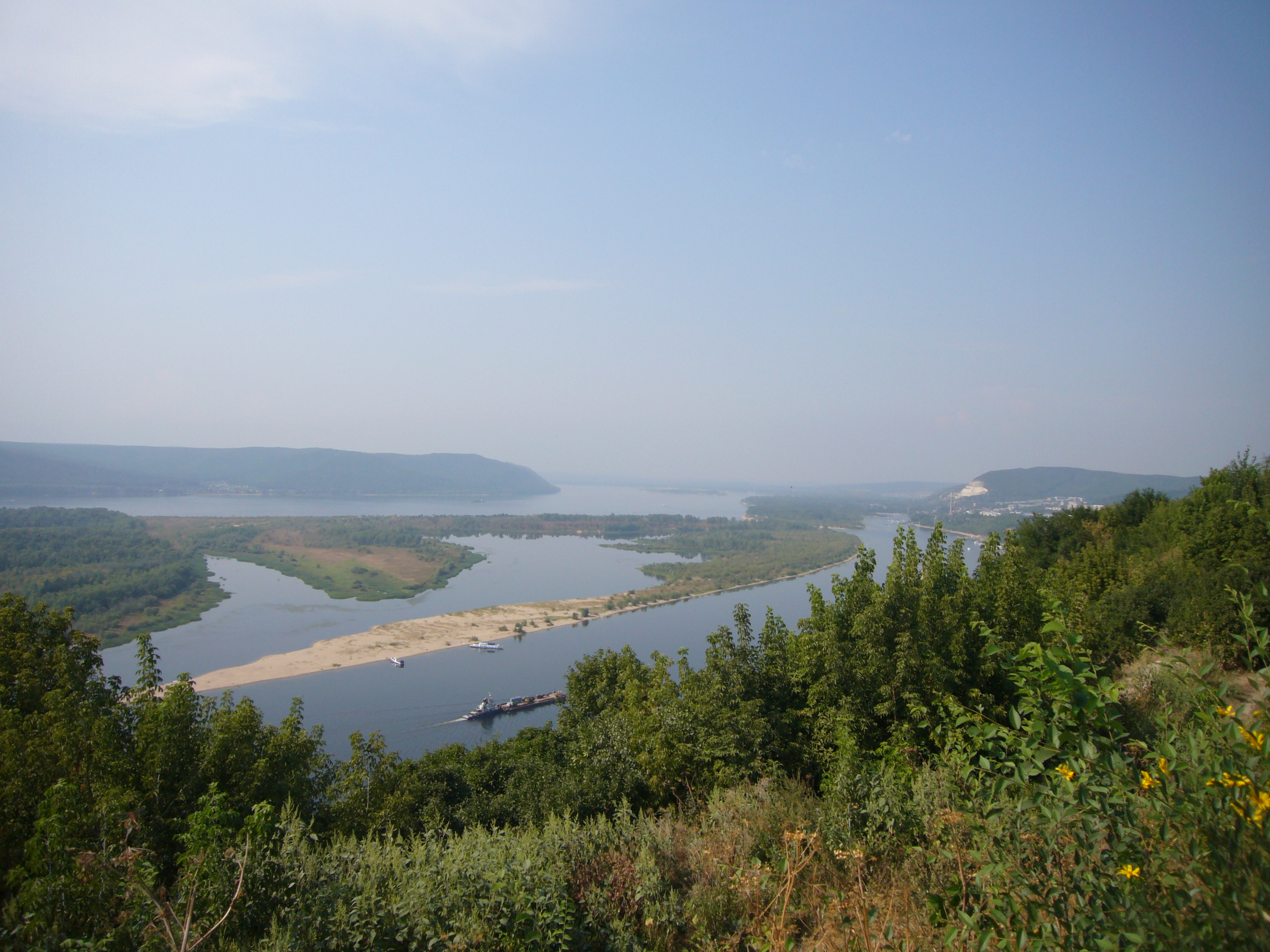 «Вертолётная площадка» в посёлке Управленческом